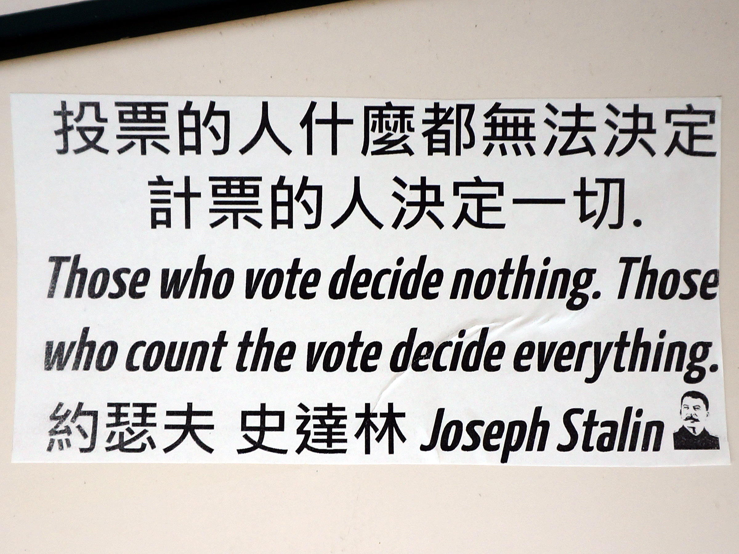 臺北市公館人行地下道內部，約瑟夫·史達林語錄貼紙：「投票的人什麼都無法決定，計票的人決定一切。」